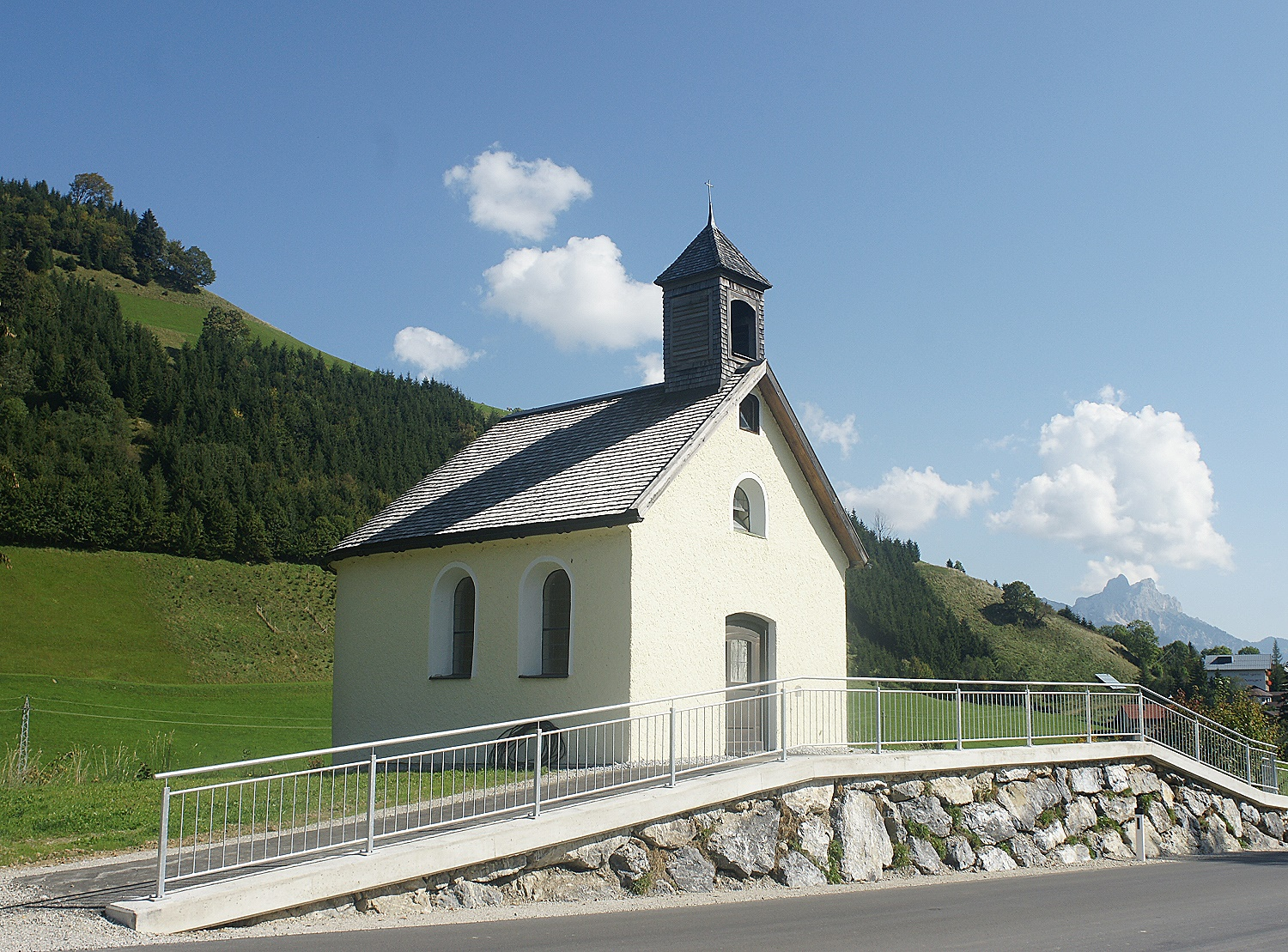 Lourdeskapelle in Katzensteig, Zöblen. Erbaut 1891/92. This media shows the remarkable cultural object in the Austrian state of Tyrol listed by the Tyrolean Art Cadastre with the ID 28360. (on tirisMaps, pdf, more images on Commons, Wikidata)